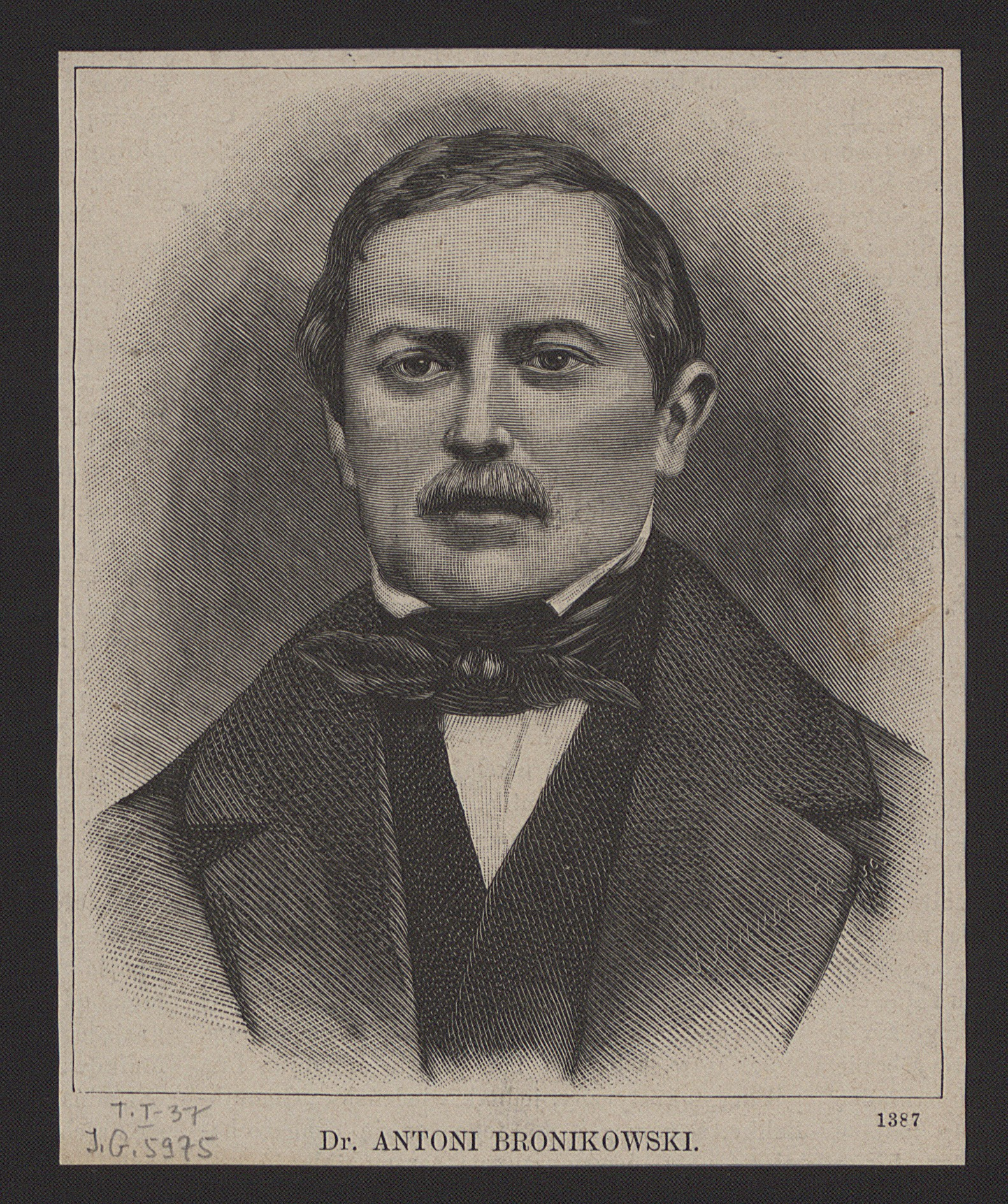 Antoni Bronikowski, [1851-1900]